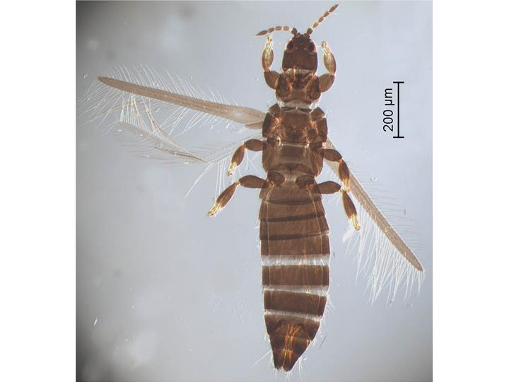 Limothrips cerealium, thrips des céréales - adulte femelle, vue dorsale